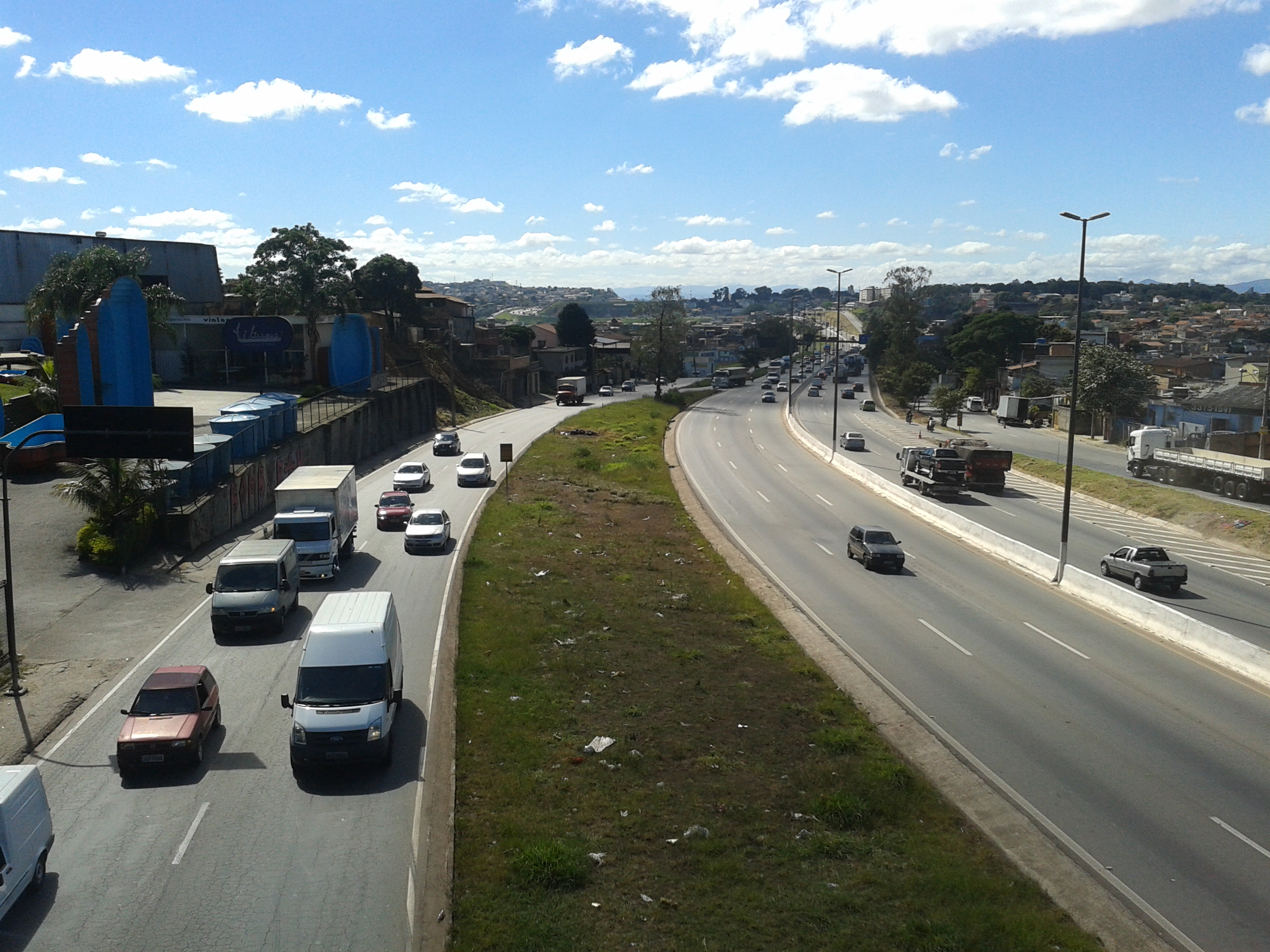 Vista do Anel Rodoviário em seu trecho de sentido BH-Acesso à Vitória-ES